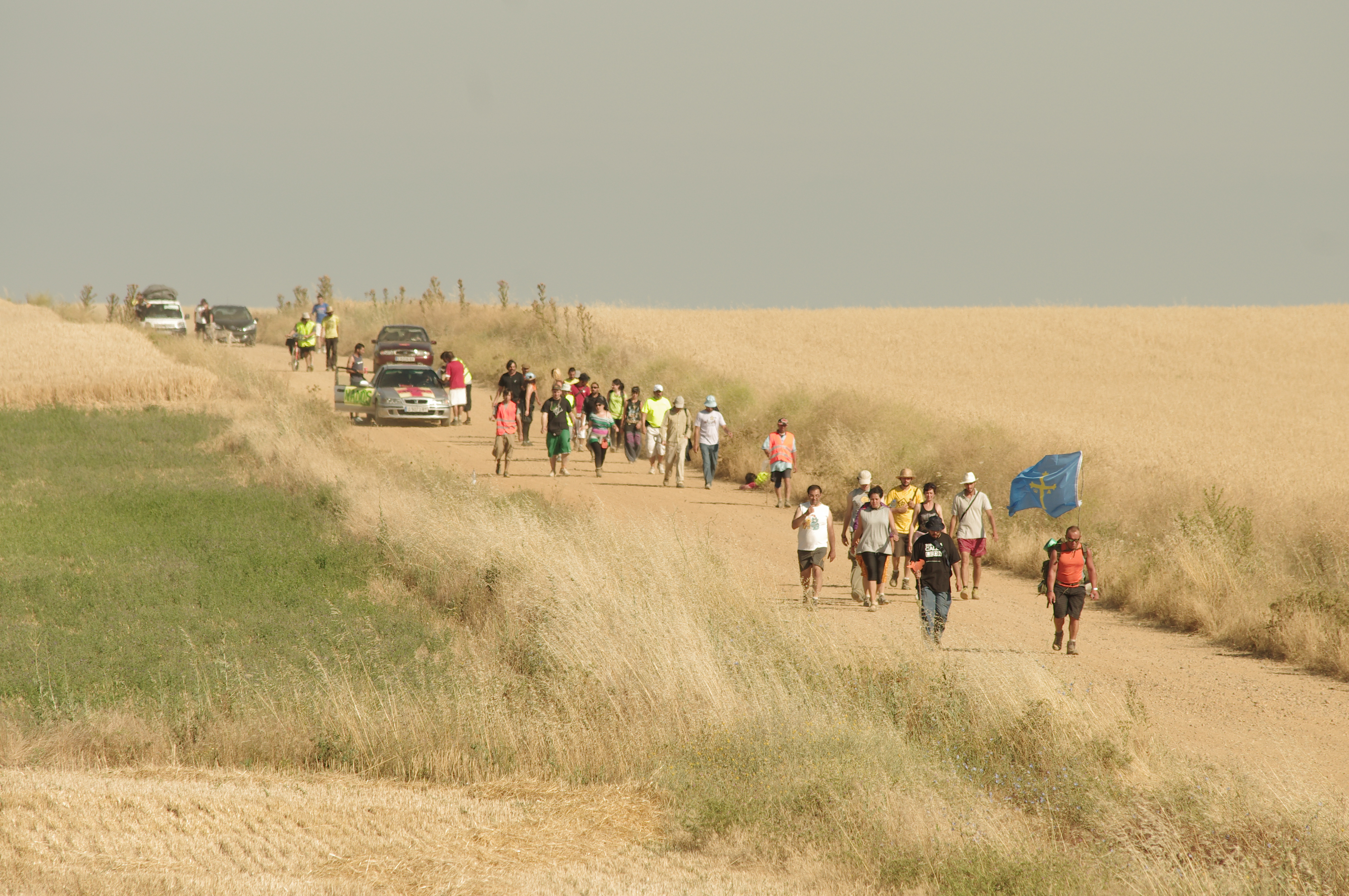 La columna Noroeste caminando hacia Madrid.